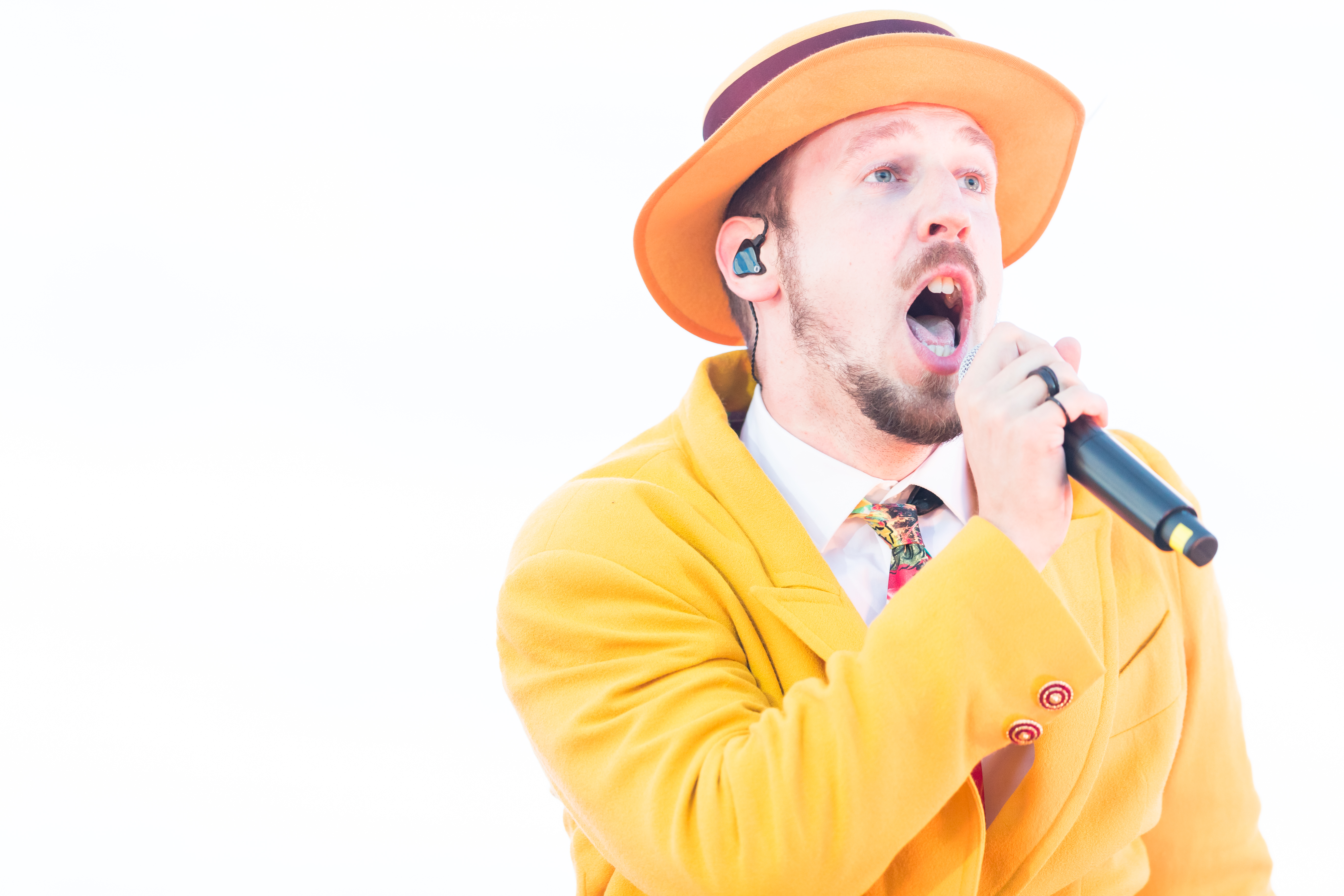 Alligatoah during CARStival at Maimarktgelände, Mannheim, Baden-Württemberg, Germany on 2020-06-20, Photo: Sven Mandel Promotion: go7.ag